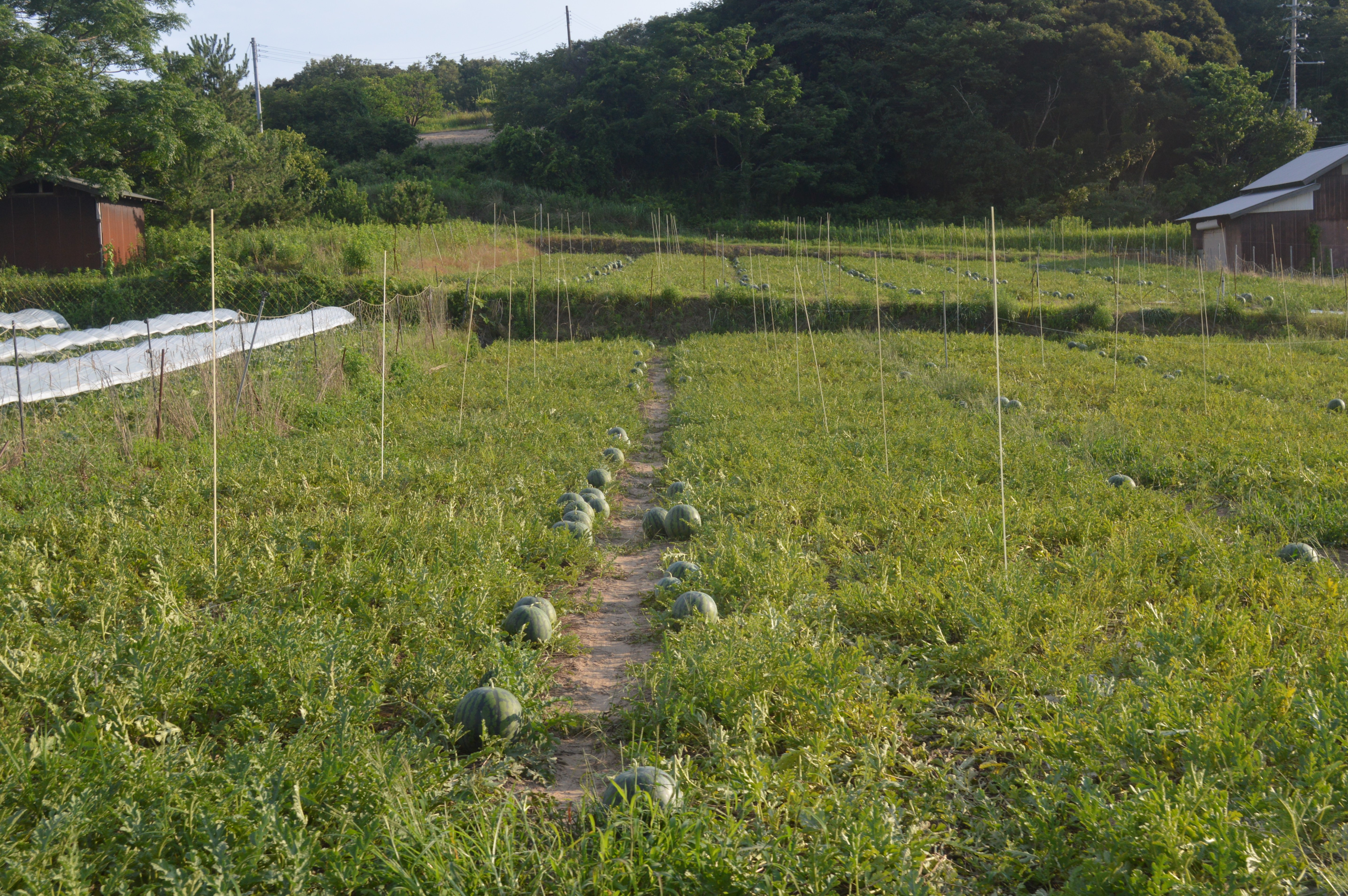 京都府京丹後市網野町俵野のスイカ畑。